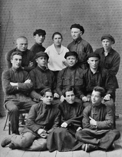 Платон Головач и Лука Бенде среди слушателей минской партшколы (Головач второй справа в верхнем ряду, Бенде крайний справа во втором ряду)